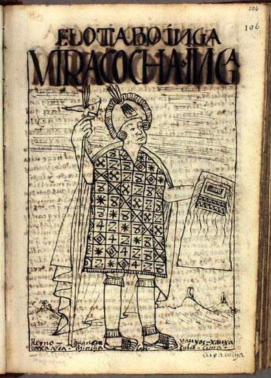 Illustration from the book El primer nueva corónica y buen gobierno